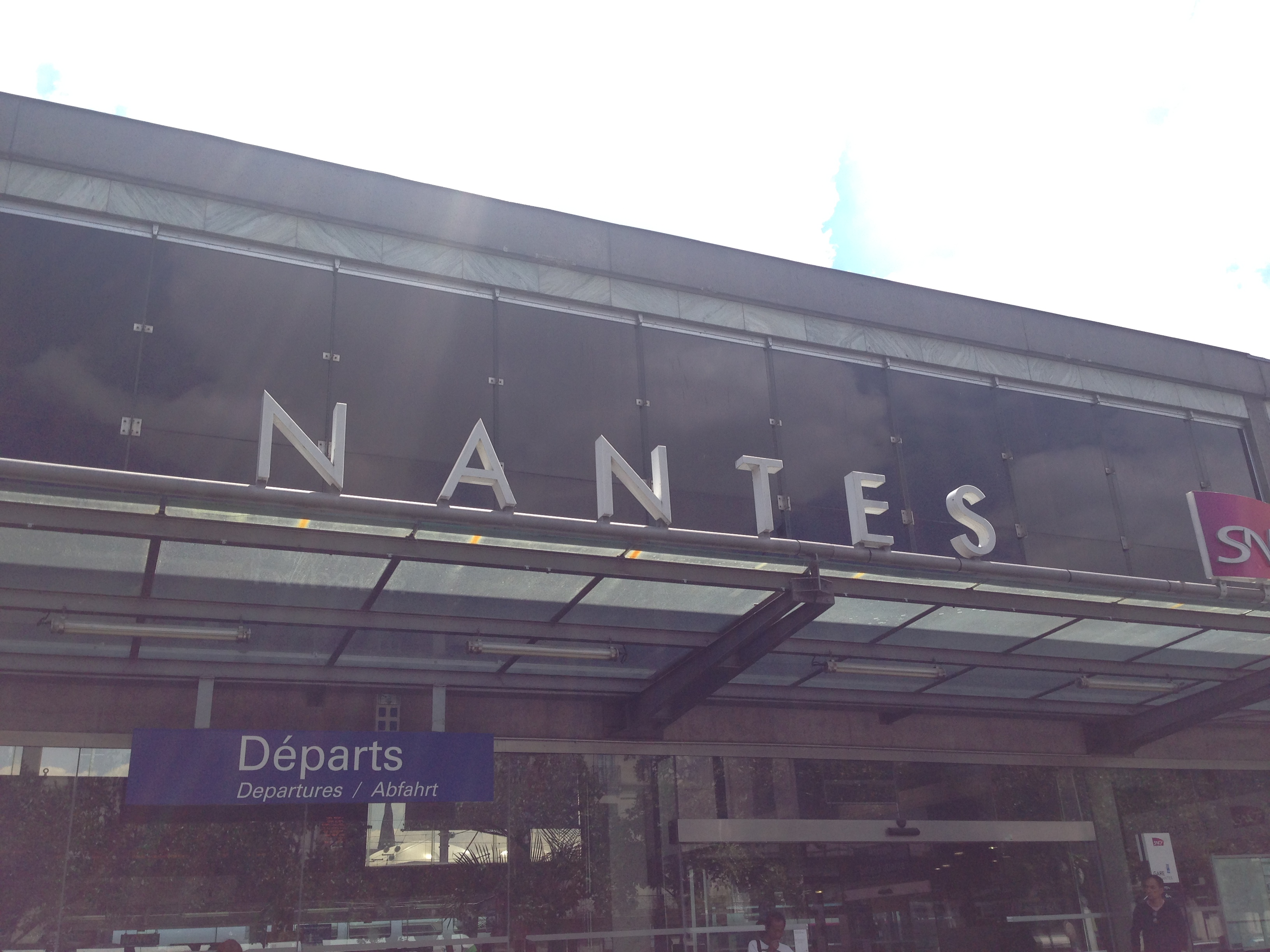 南特站（Gare de Nantes）